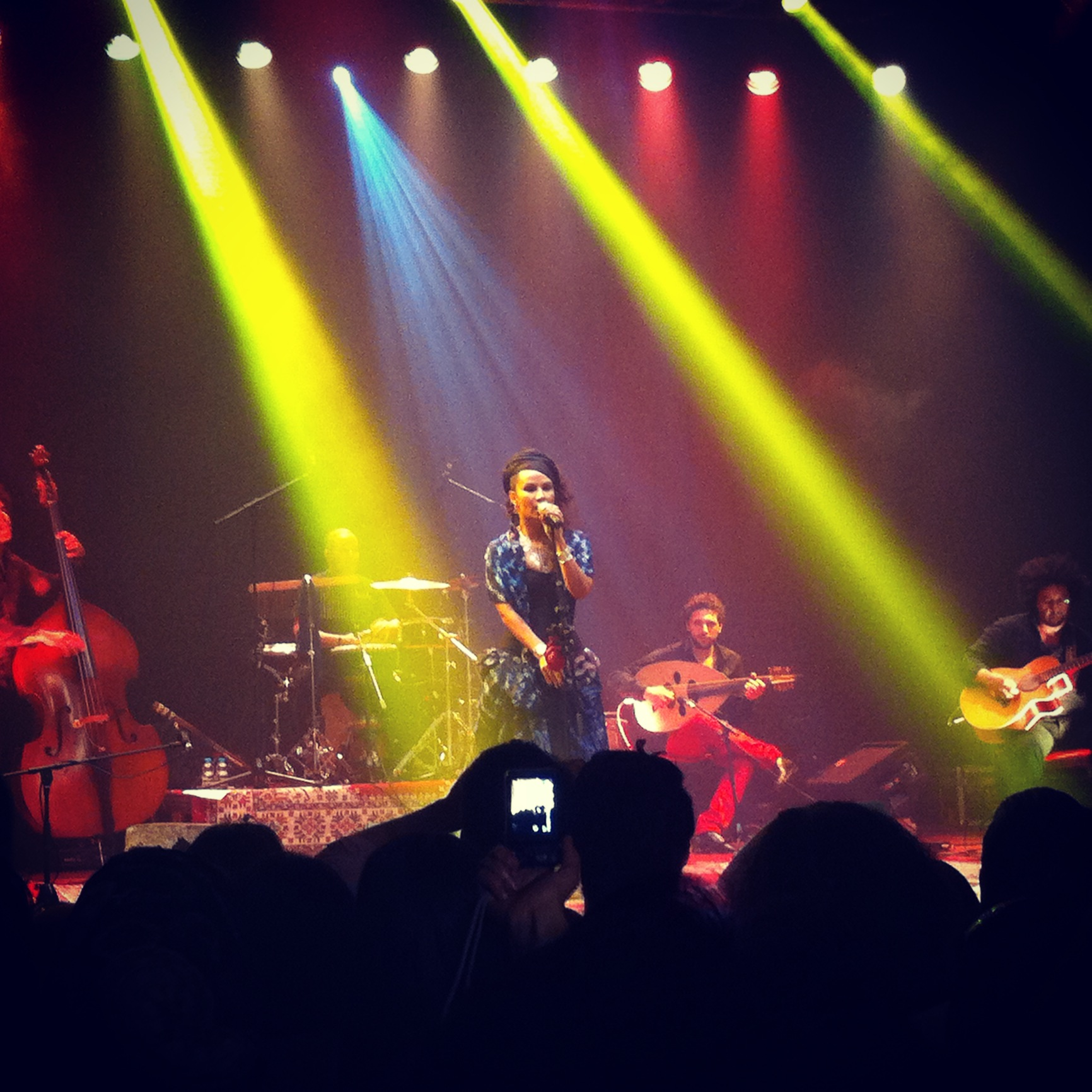 Oum en concert à Rabat